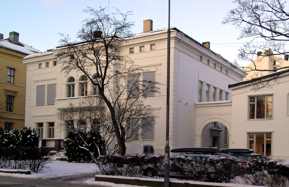 Wergelandsveien 25, Oslo. Built 1847. Architect: Johan Nebelong.